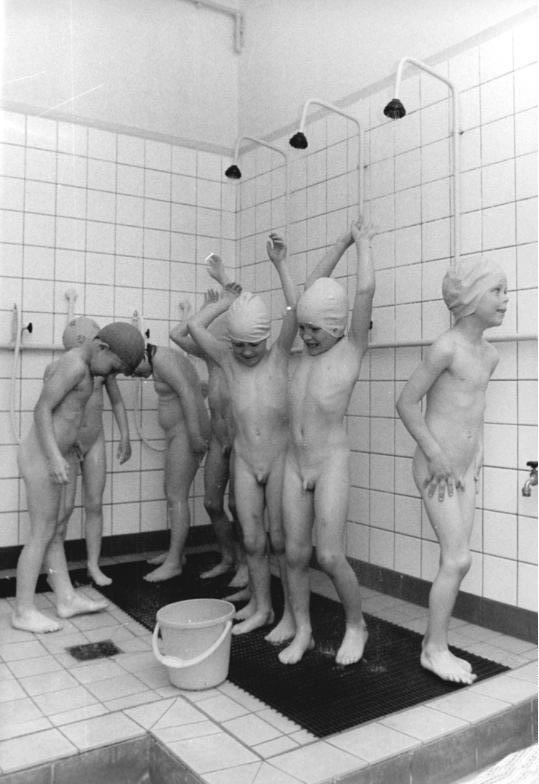 Köritz, Duschraum des Kindergartens Zum Beitrag: Das "Kinderschloß" von Neustadt-Lernen und Fröhlichkeit im ehemaligen Herrensitz ADN-ZB Grimm.9.6.1987-ha. Das ehemalige Gutshaus der Junkersippen von Wolf und von Arnim ist seit Jahrzehnten Domizil für den Kindergarten von Köritz, ein Ortsteil von Neustadt-Dosse. Das 120 Jahre alte Gebäude wurde vor einem Jahr rekonstruiert, modernisiert und ausgebaut übergeben. Zur zweckmäßigeren Raumeinteilung kam ein Heizhaus. Ferner wrurde eine zentrale Wasserversorgung und -entsorgung eingebaut, so daß die Kinder jetzt auch duschen können (unser Foto). (Hierzu gehören 1987-0609-300 - 302N